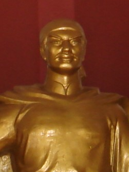 Tượng Nguyễn Nhạc trong bảo tàng Quang Trung